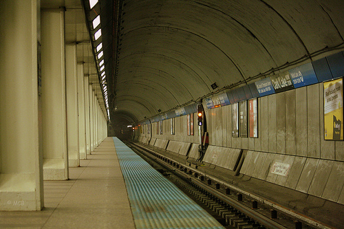 Photo de la station Clark/lake dans le tunnel